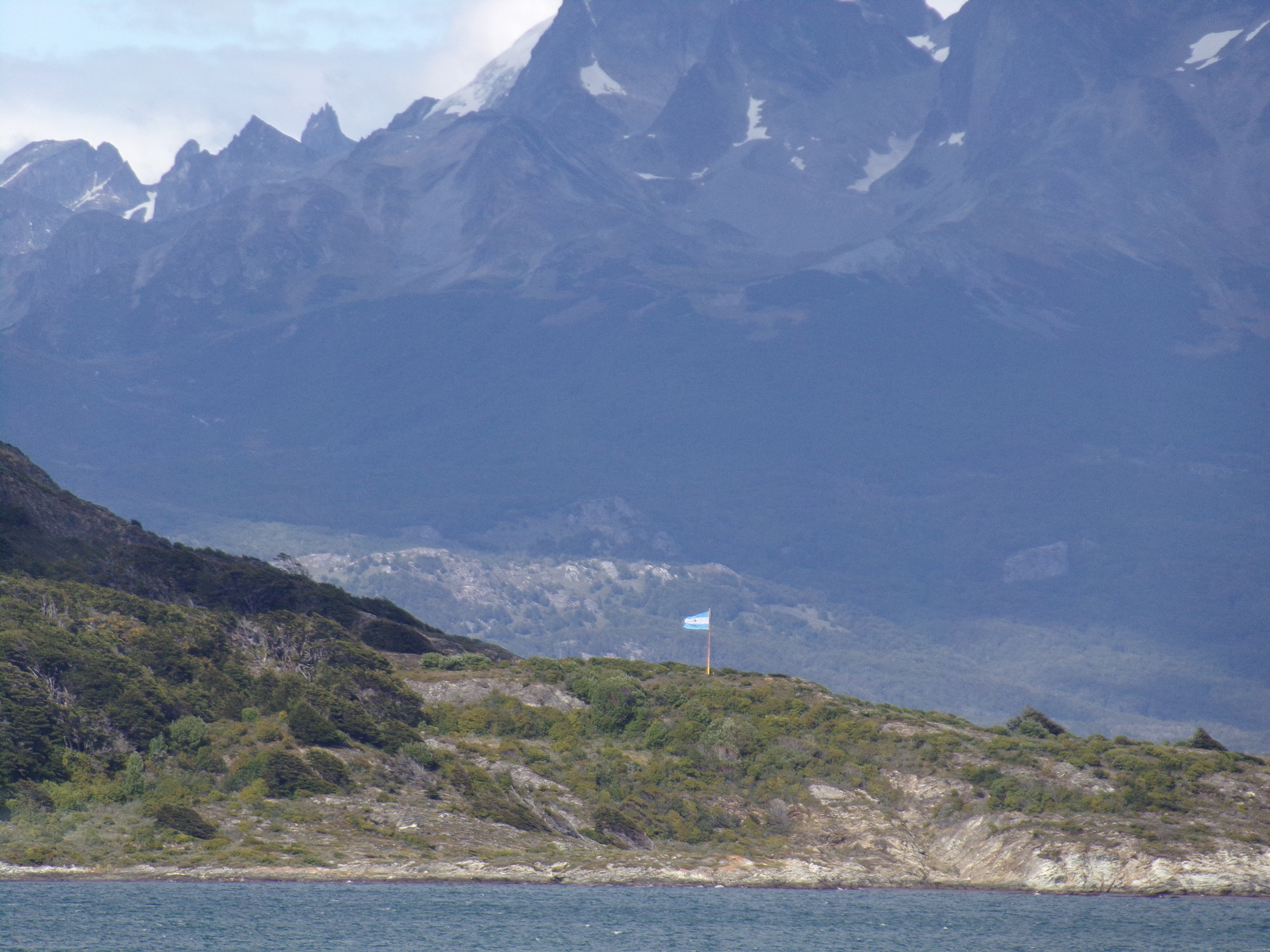 Bandera argentina en Isla Redonda, Tierra del Fuego. Esta isla formó parte del conflicto del Beagle con Chile.